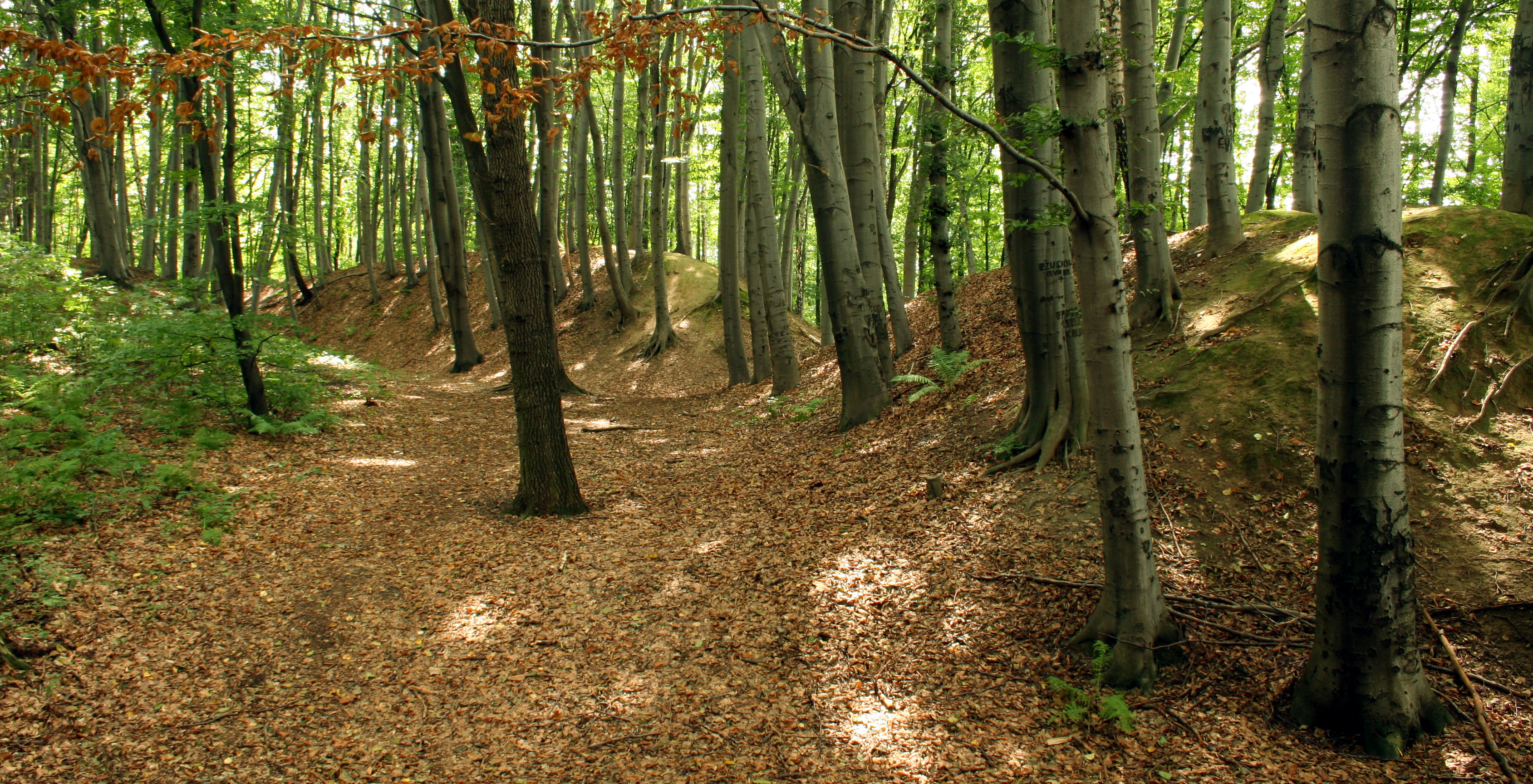 gordzisko_Lubomii, powiat wodzisławski, fragment od strony południowej